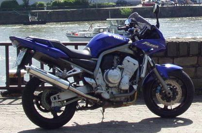 Yamaha FZS 1000 Fazer, Bj. 2001, Deep Purplish Blue Metallic (DPBMC). Sonstiges: Das Foto entstand bei einem Ausflug am Rhein auf der rechtsrheinischen Seite gegenüber Boppard.